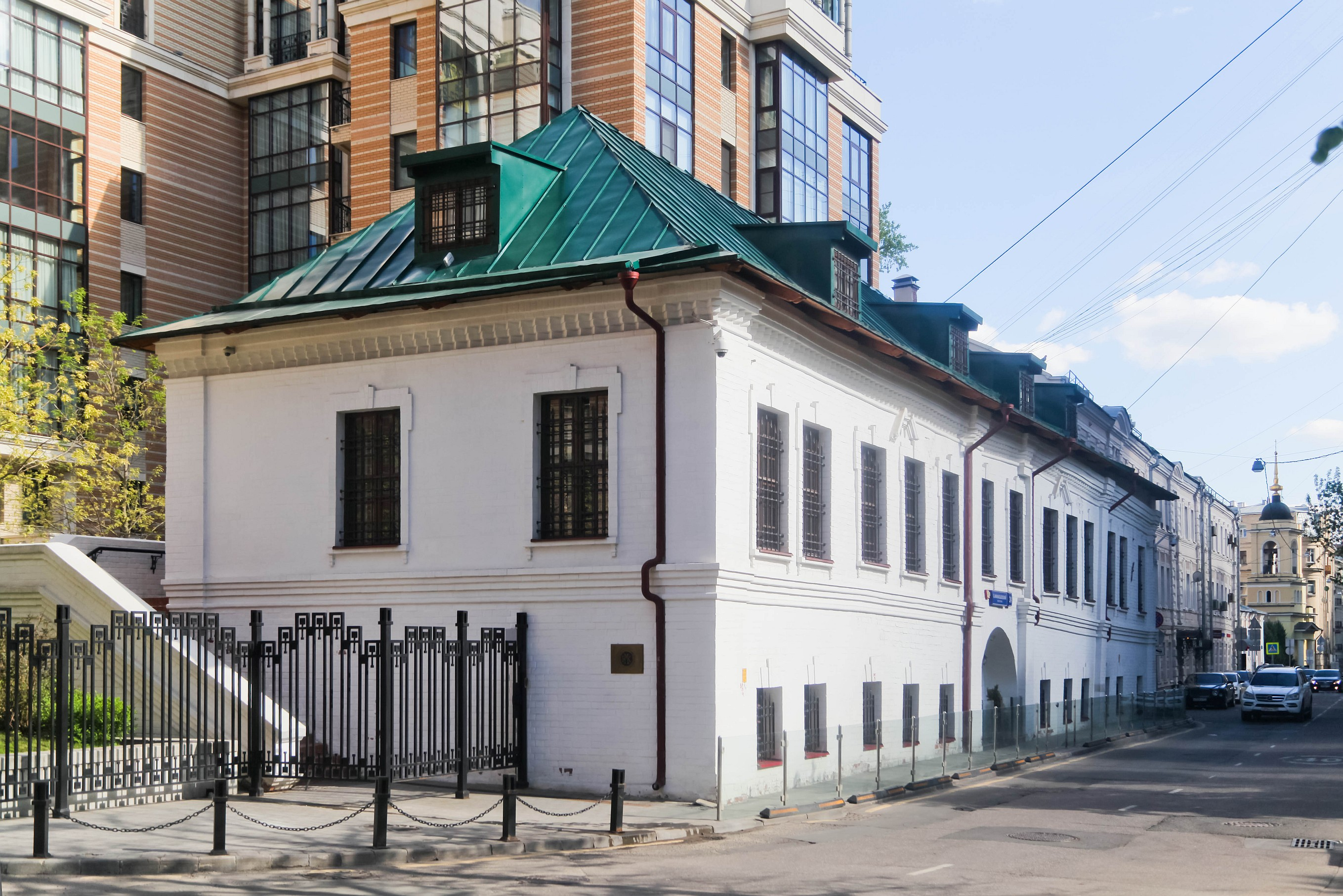 Музей Международного нумизматического клуба, Москва